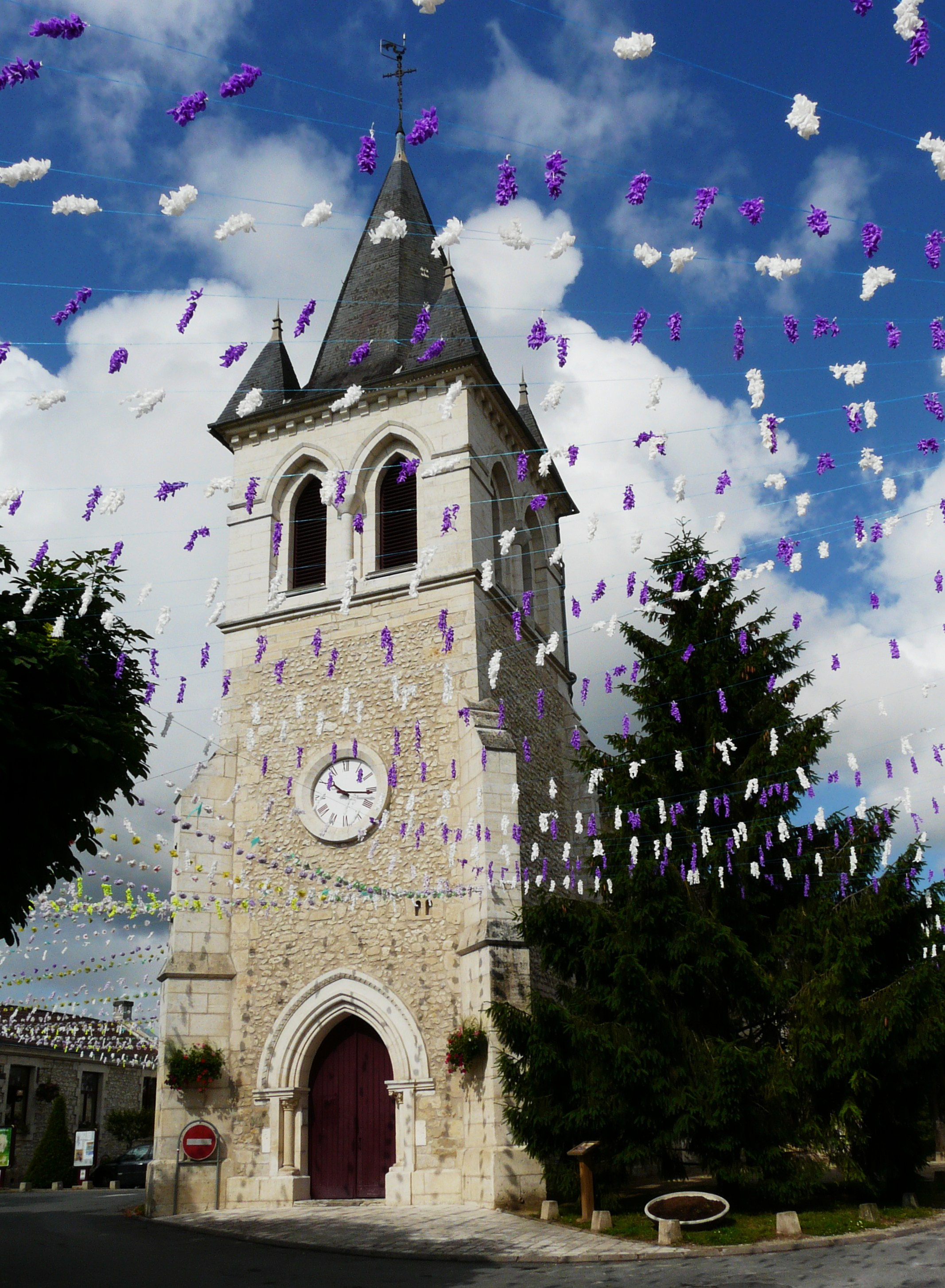 La façade est de l'église Saint-Marc, Champcevinel, Dordogne, France.